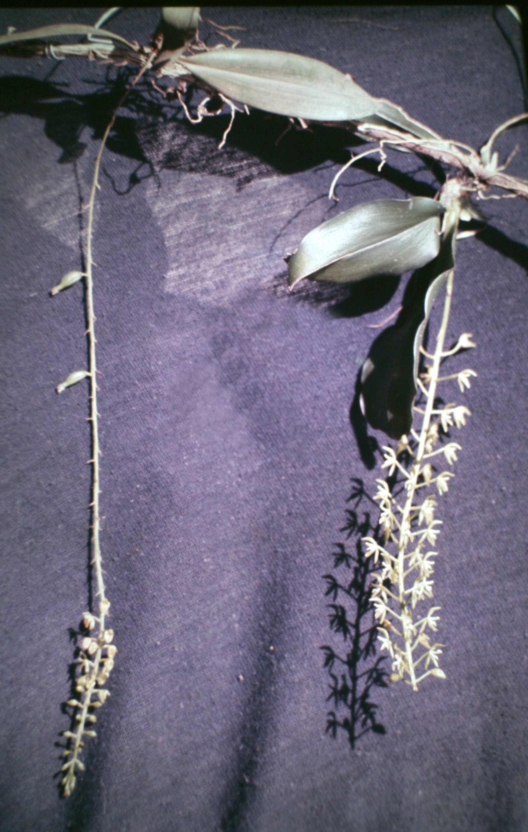 Notylia sagittifera. Suriname.